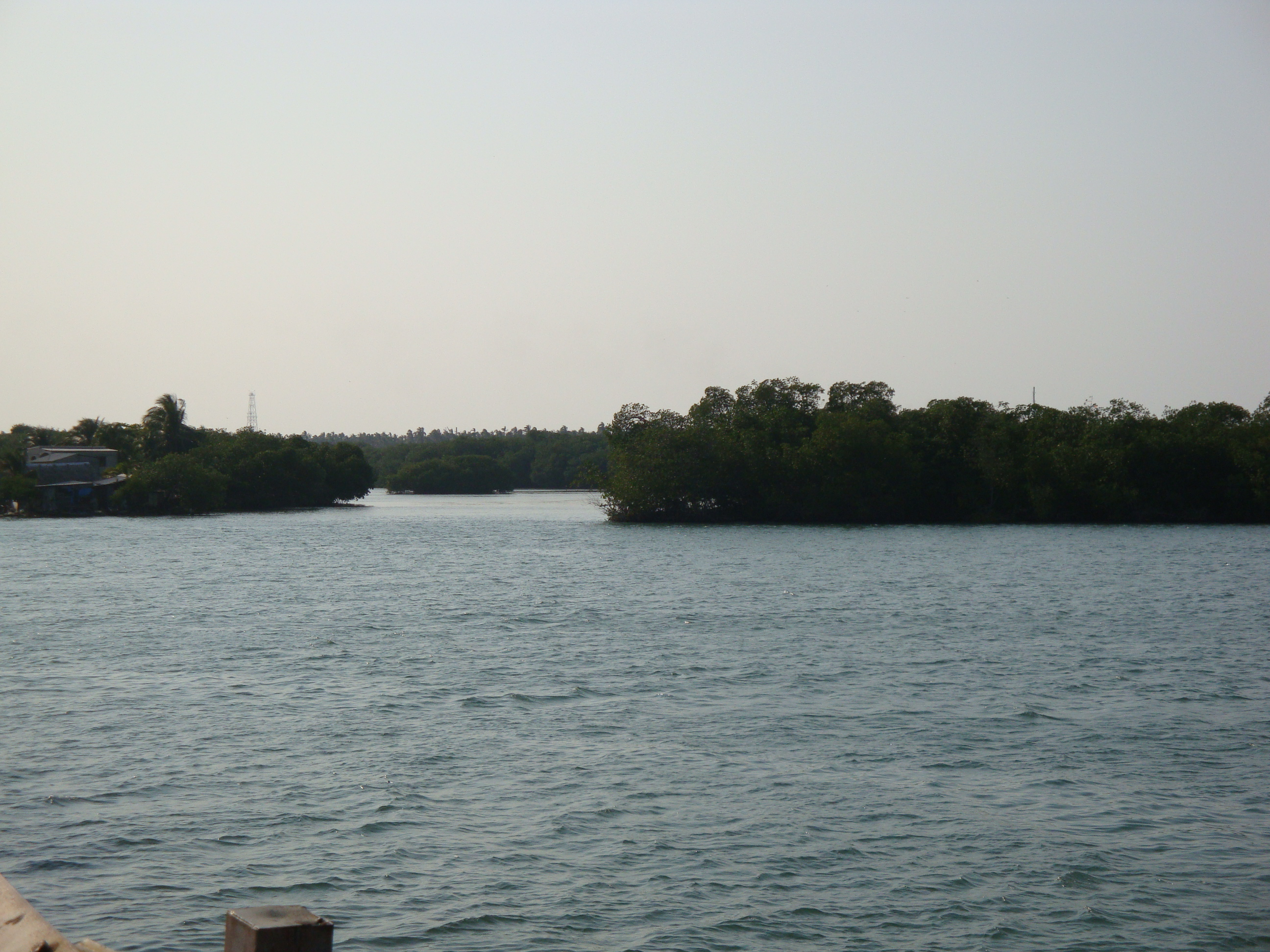 Manglares en la laguan El Bellote, municipio de Paraíso, Tabasco.